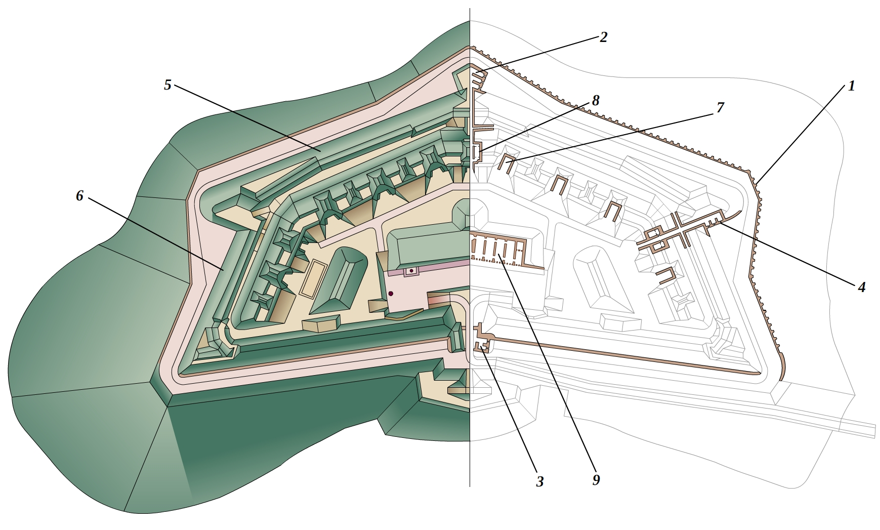 План 4-го форта крепости Брест-Литовск после первой его модернизации (1888 год).